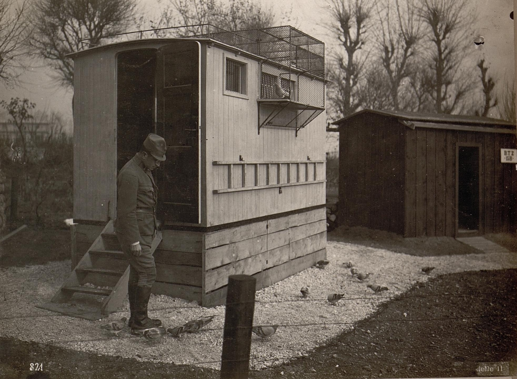 Trient.(Doss di Trento)Taubenwagen.